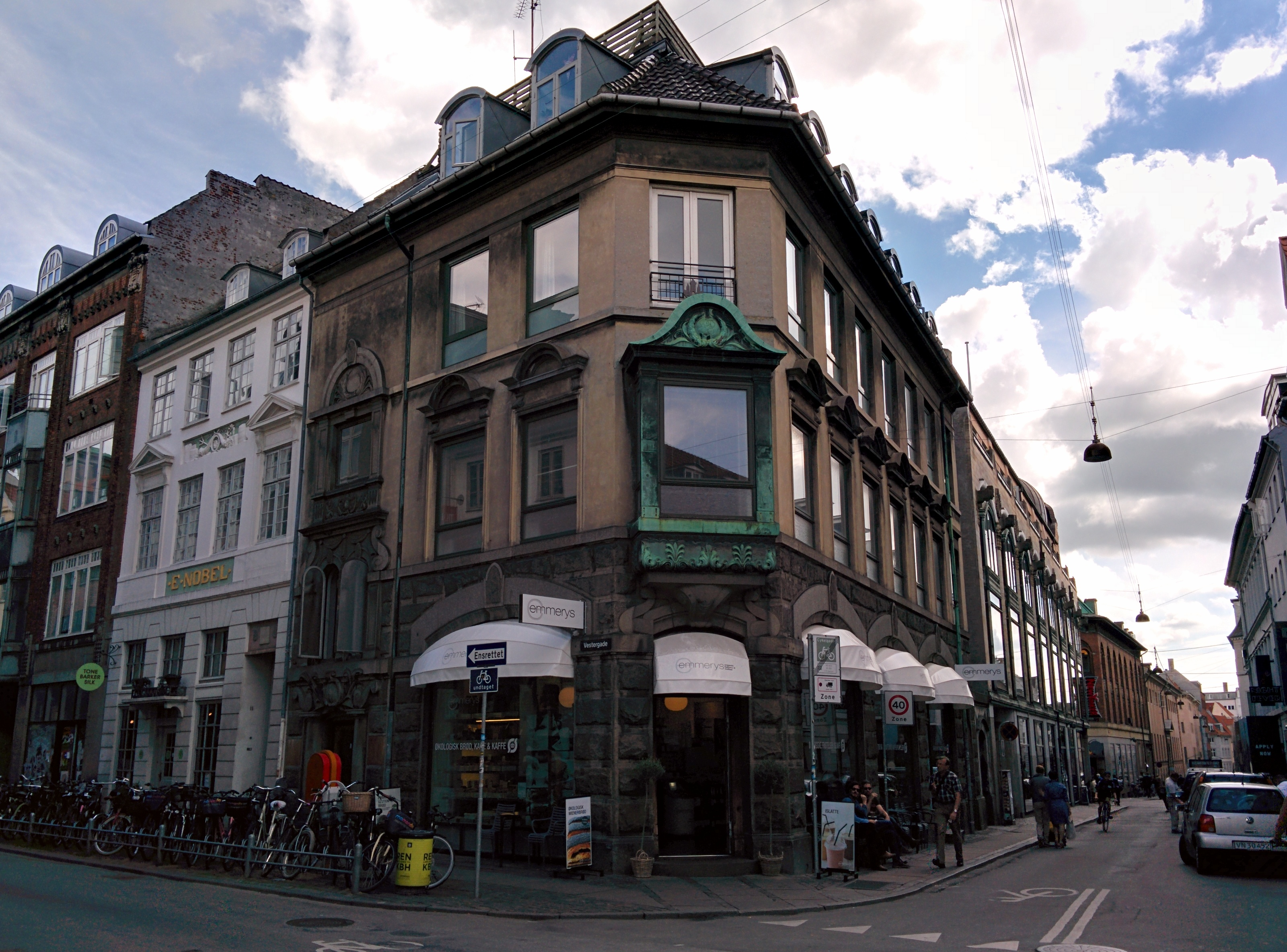 TThe corner of Vestergade (No. 13) and Kattesundet in Copenhagen, Denmark